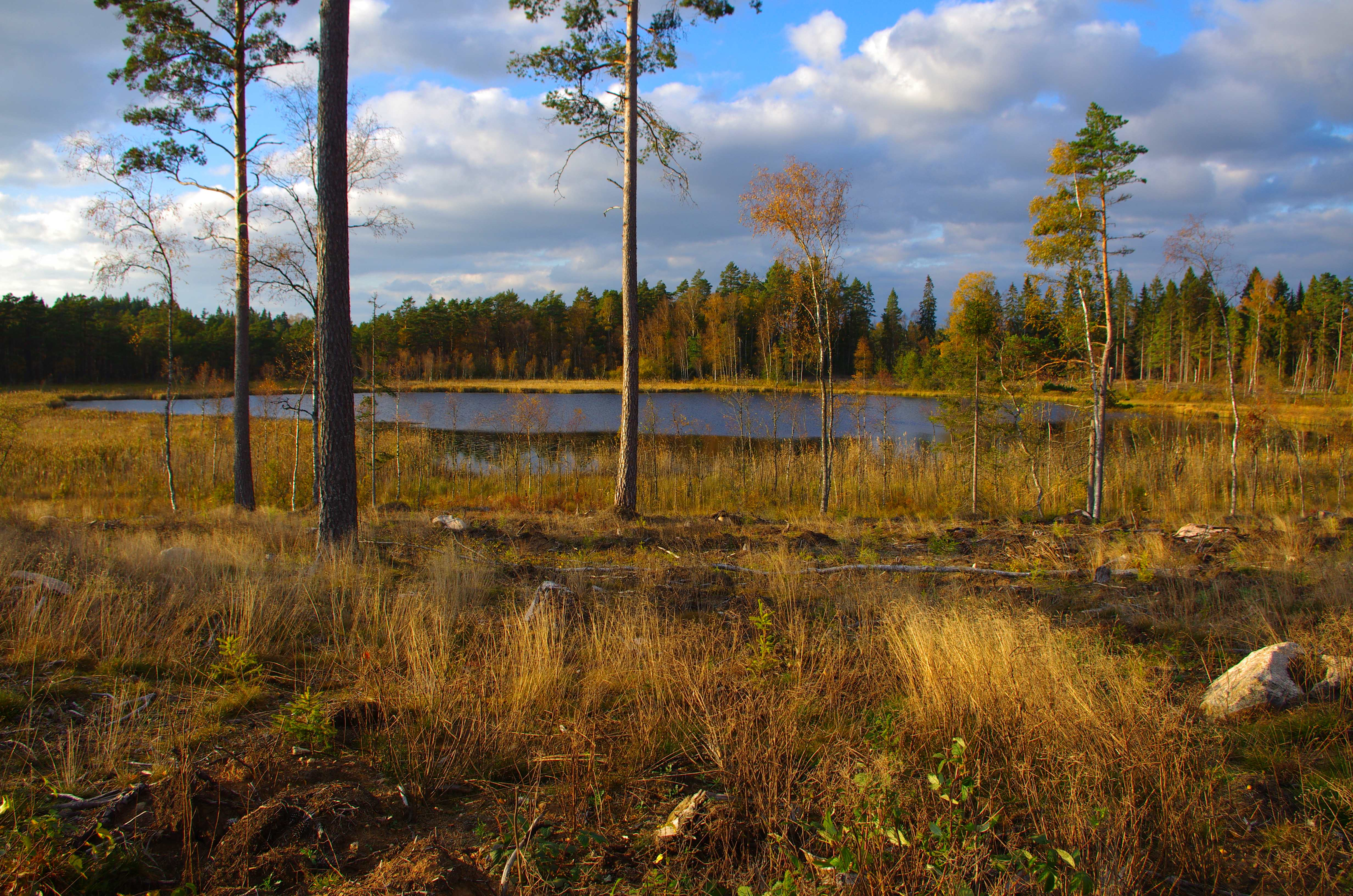 Lilla Eketången är en sjö i östra utkanten av Vara kommun i Västergötland i Sverige. Omkring 500 m väster ut rinner Lidan.